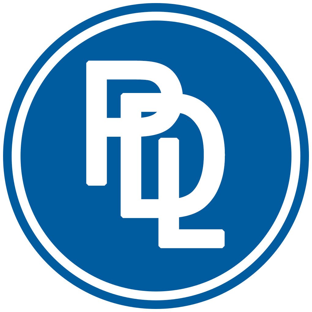 Partido Demócrata Liberal de San Luis